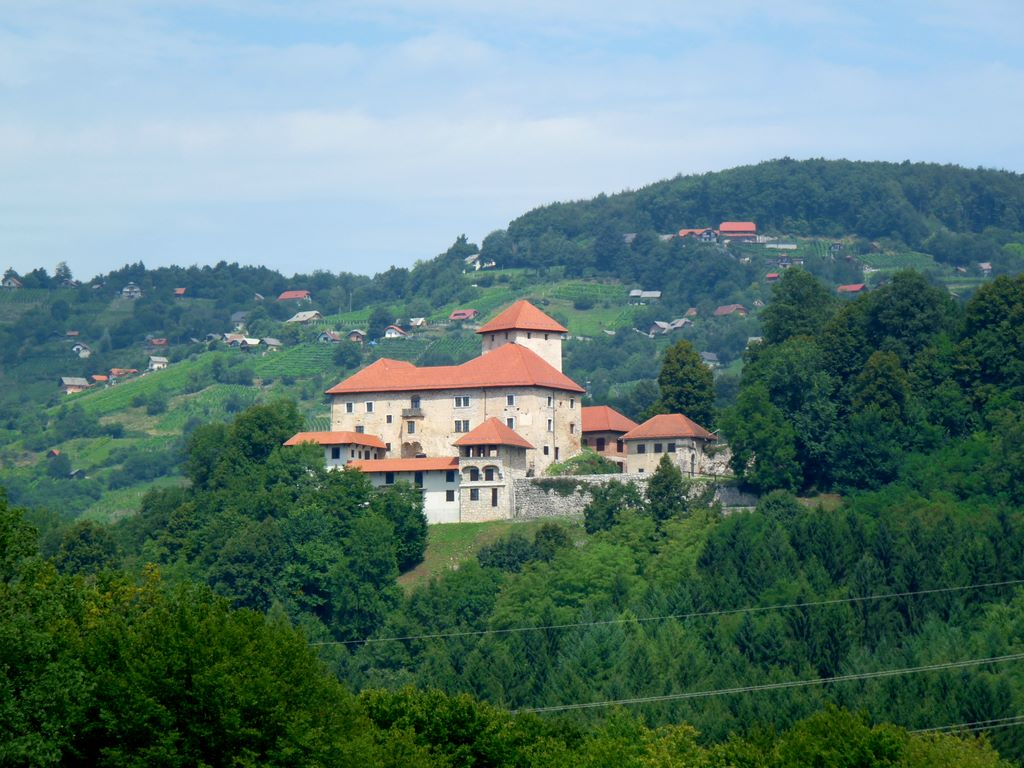 Stari grad nad Otočcem (Zagrad pri Otočcu)